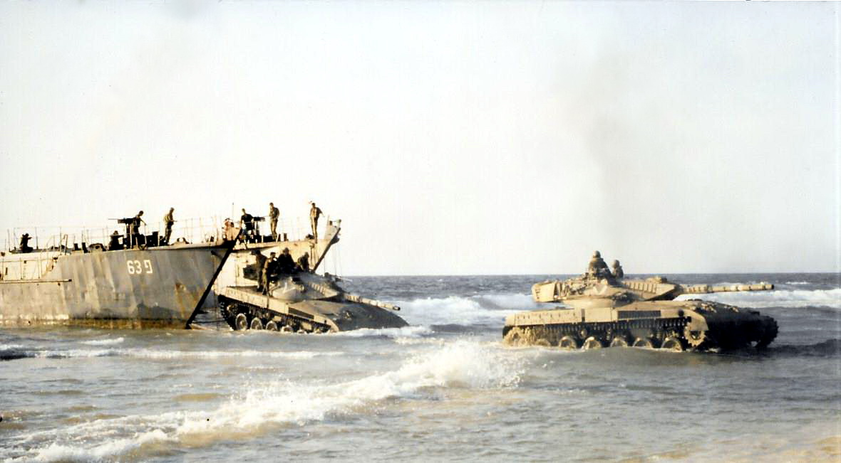 אח"י אשקלון פ-63 מנחיתה טנק מרכבה